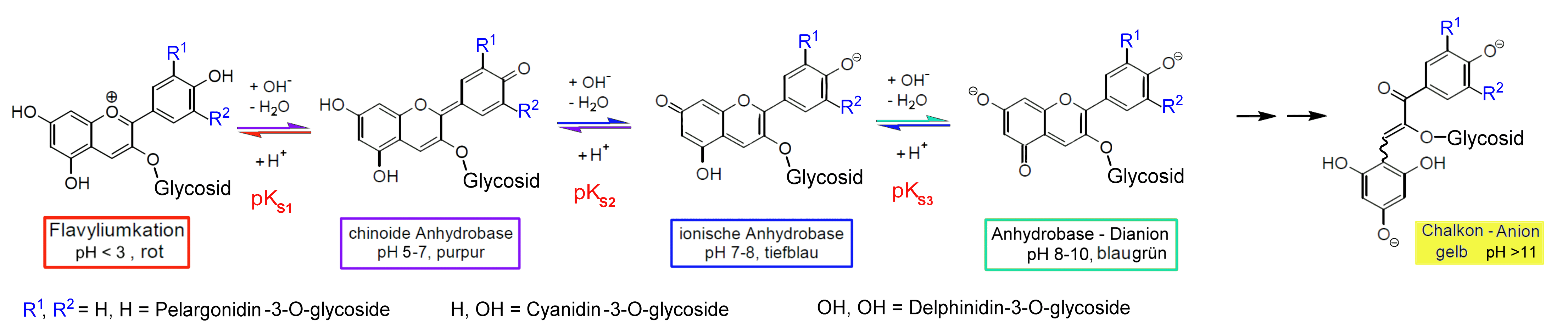 Anthocyanidin-3-O-Glycoside – Struktur – pH-Abhängigkeit